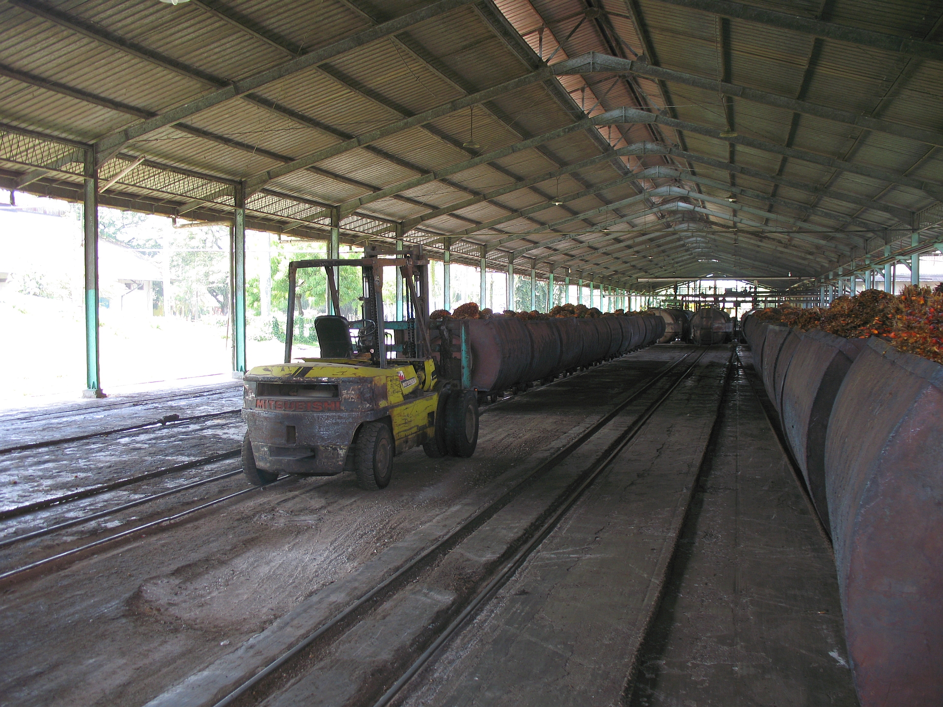 Sawit Seberang, 31.07.2008